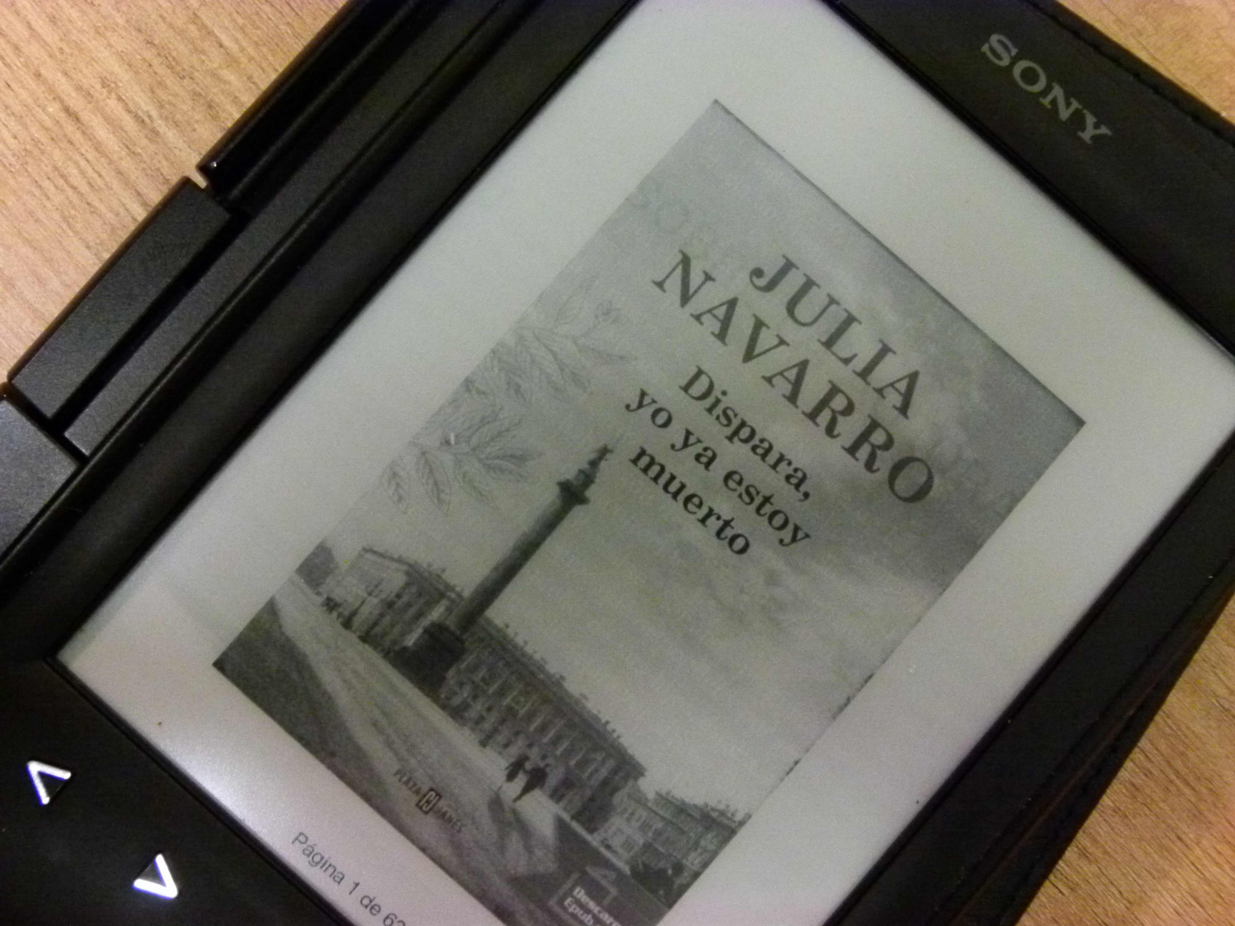 Portada del ebook con el titulo del libro de Julia Navarro.